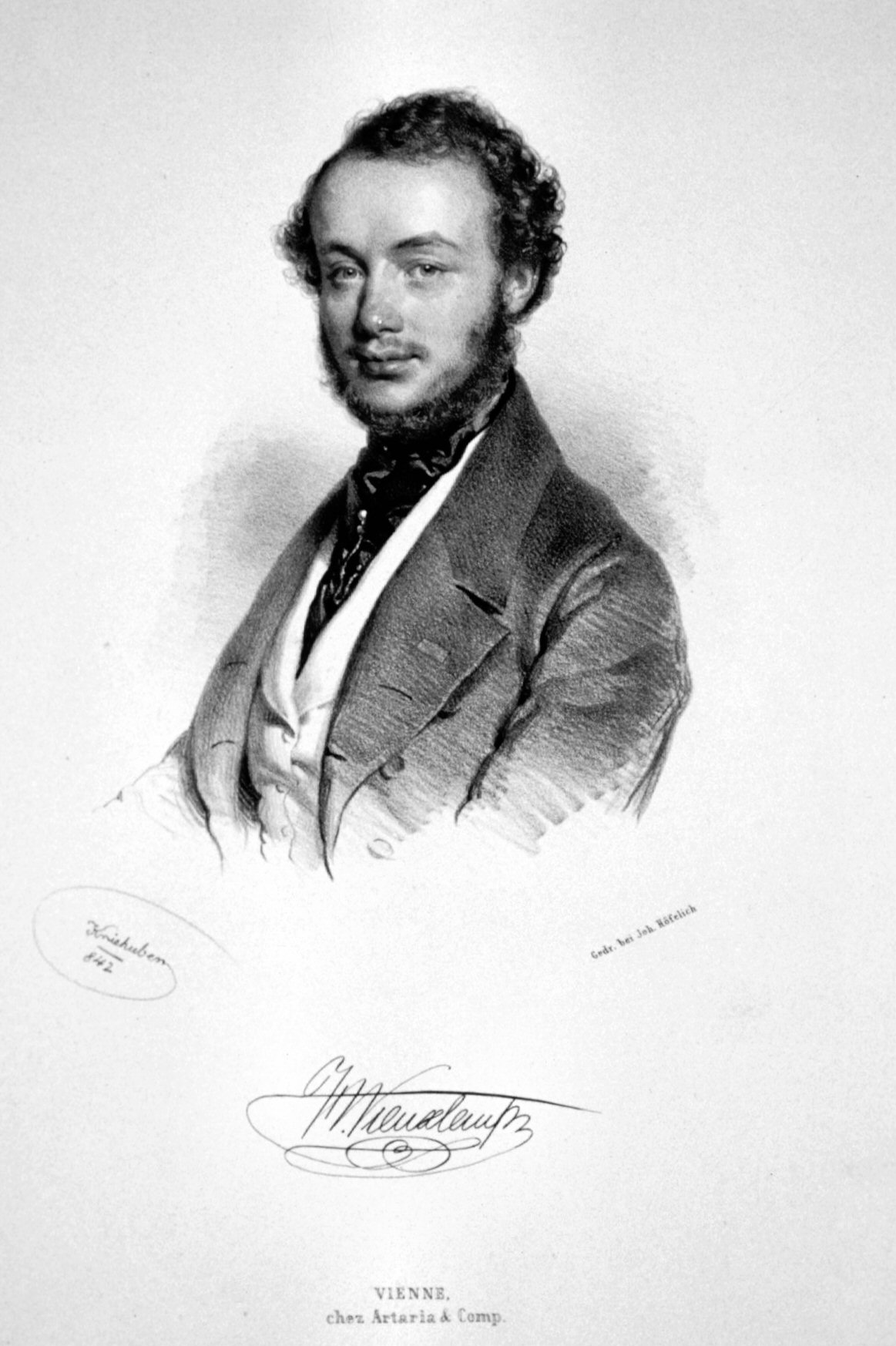 Henri Vieuxtemps (1820-1881), belgischer Geigenvirtuose und Komponist.